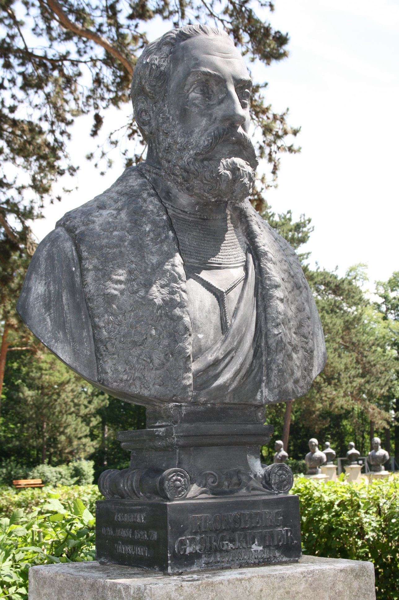 Büste in der Gedenkstätte Heldenberg (Niederösterreich)